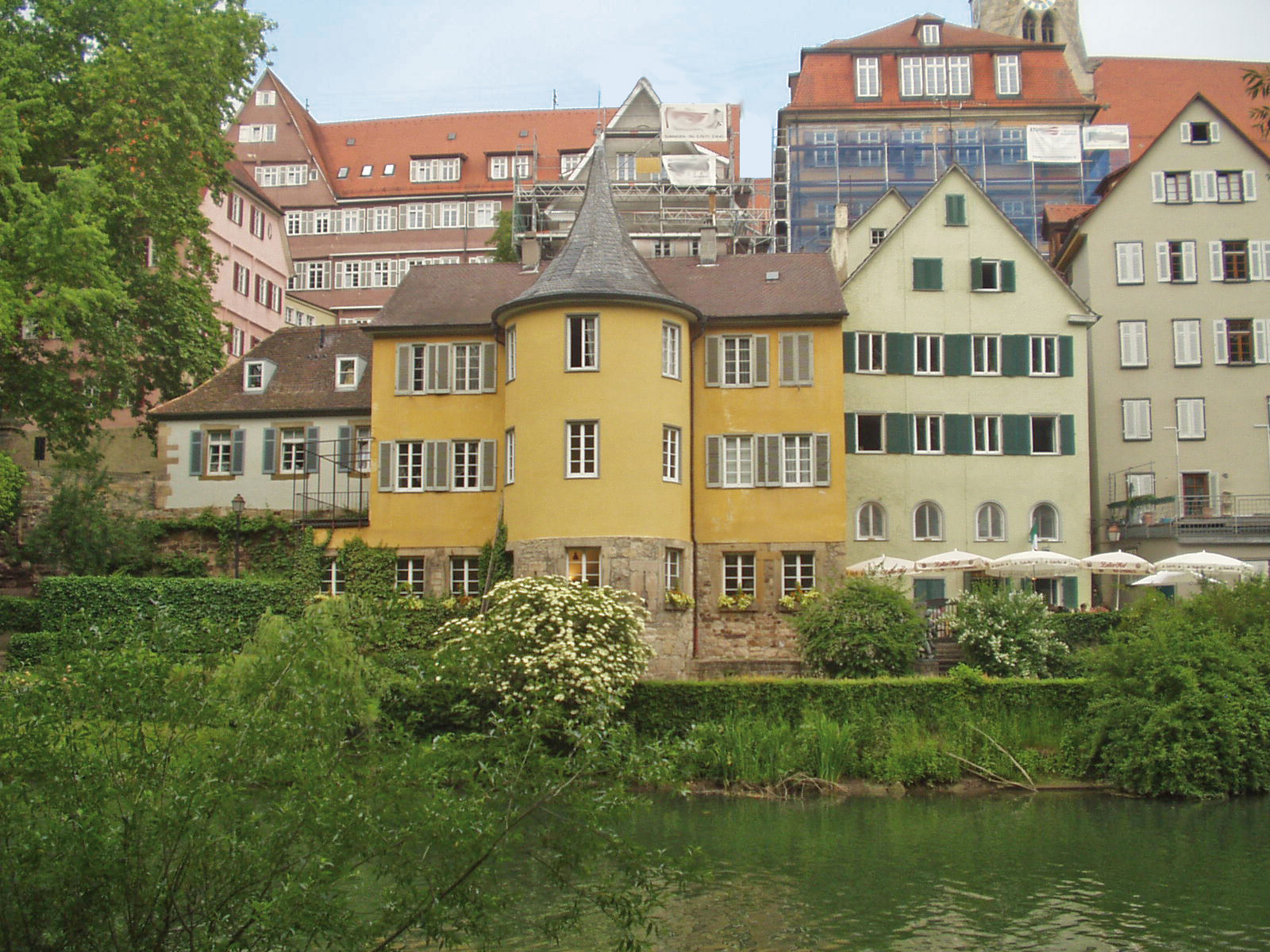 Hölderlinturm, Tübingen